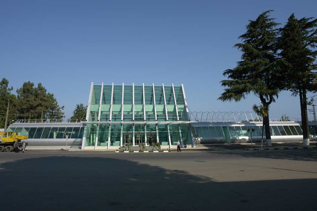 NEW STATIONS GEORGIA 2006 BATUMI. Makhinjauri Station